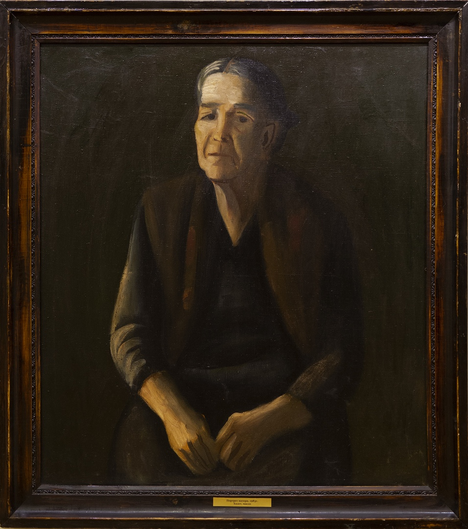 Холст, масло, Частная коллекция